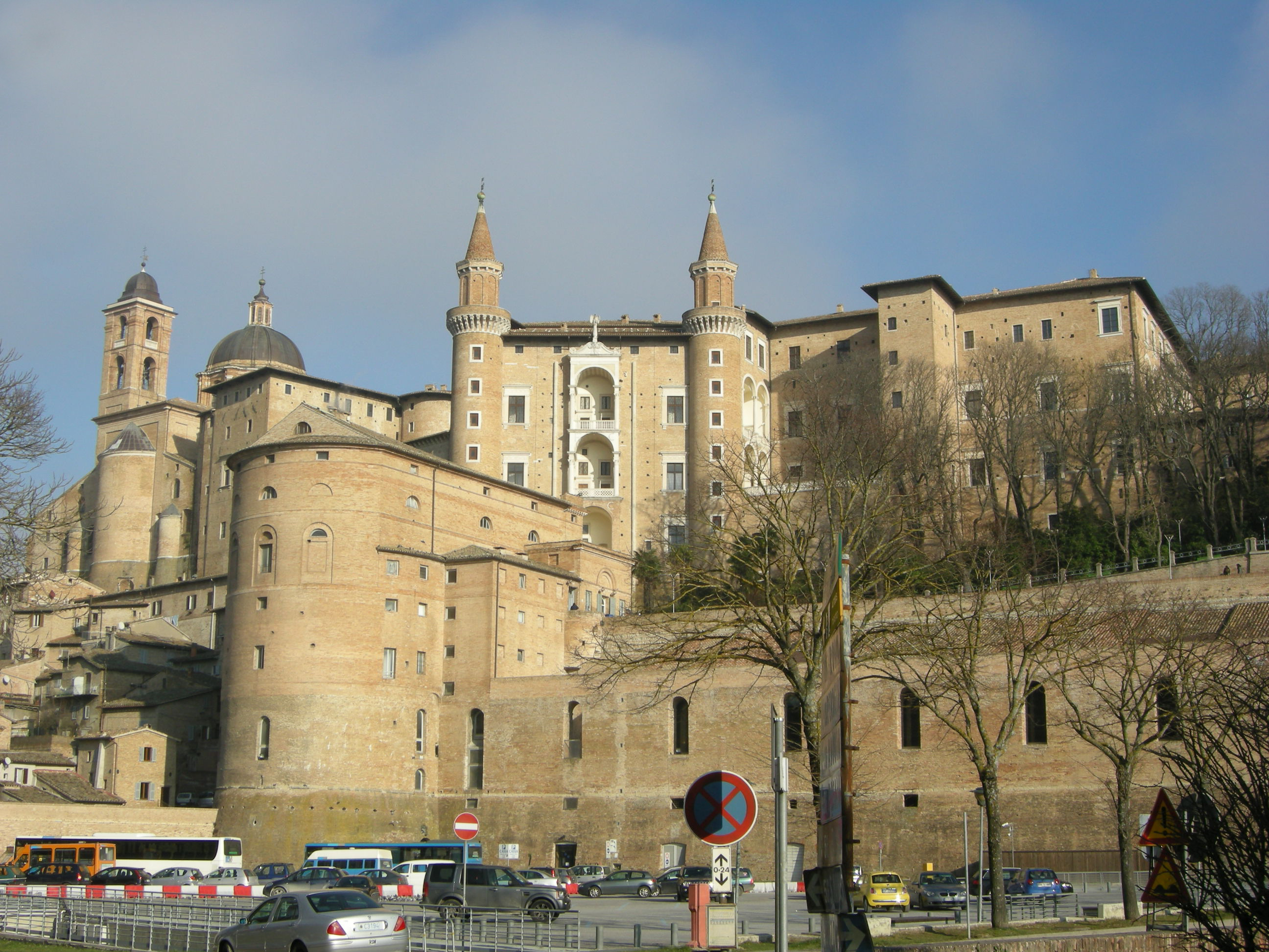 Urbino, palazzo ducale visto dal mercatale